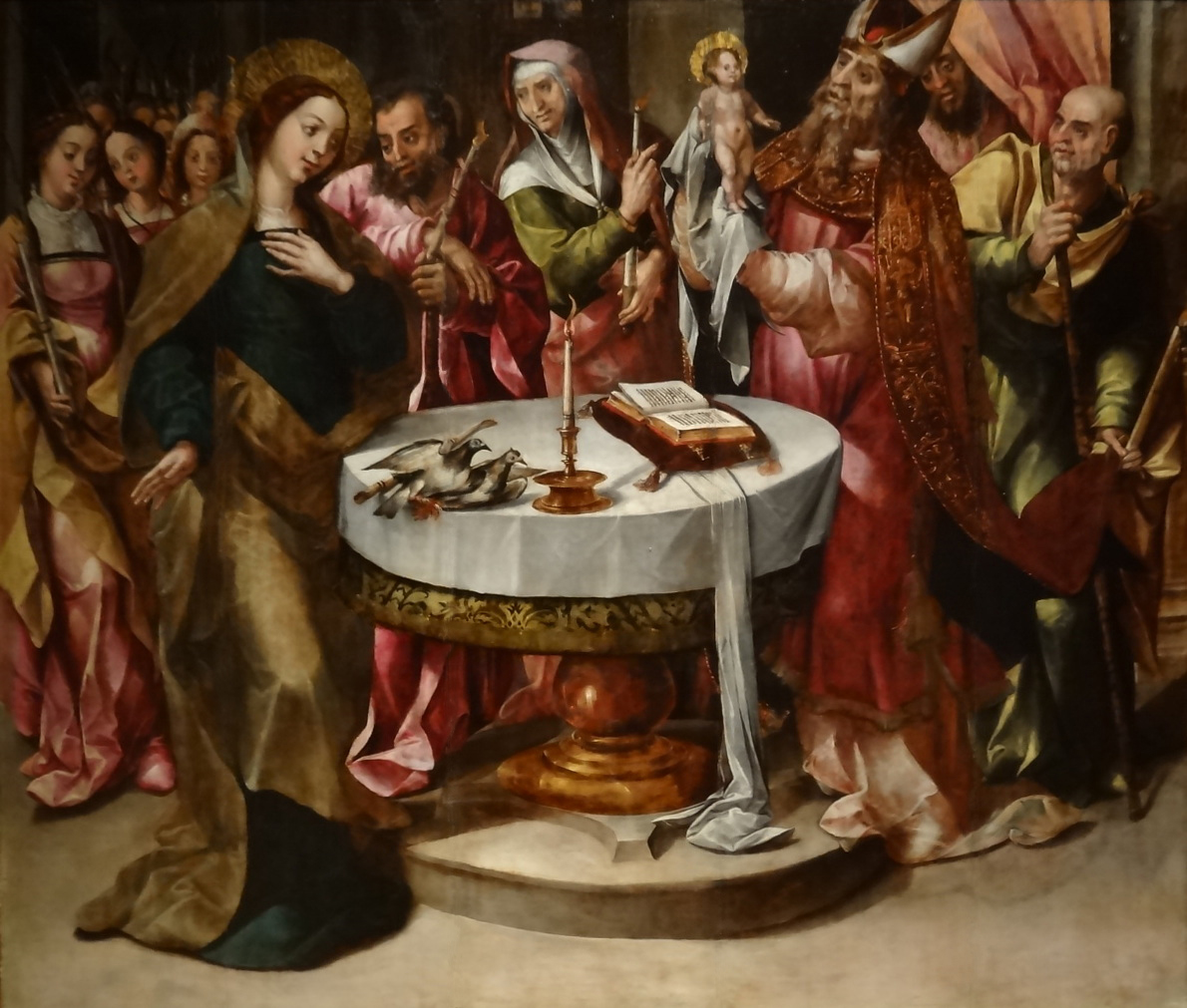 Apresentação no Templo, pintura a óleo sobre madeira de cerca de 1550-60, do chamado Mestre de Abrantes. Faz parte do Políptico da Igreja S. Brás, no Arco da Calheta, Ilha da Madeira.